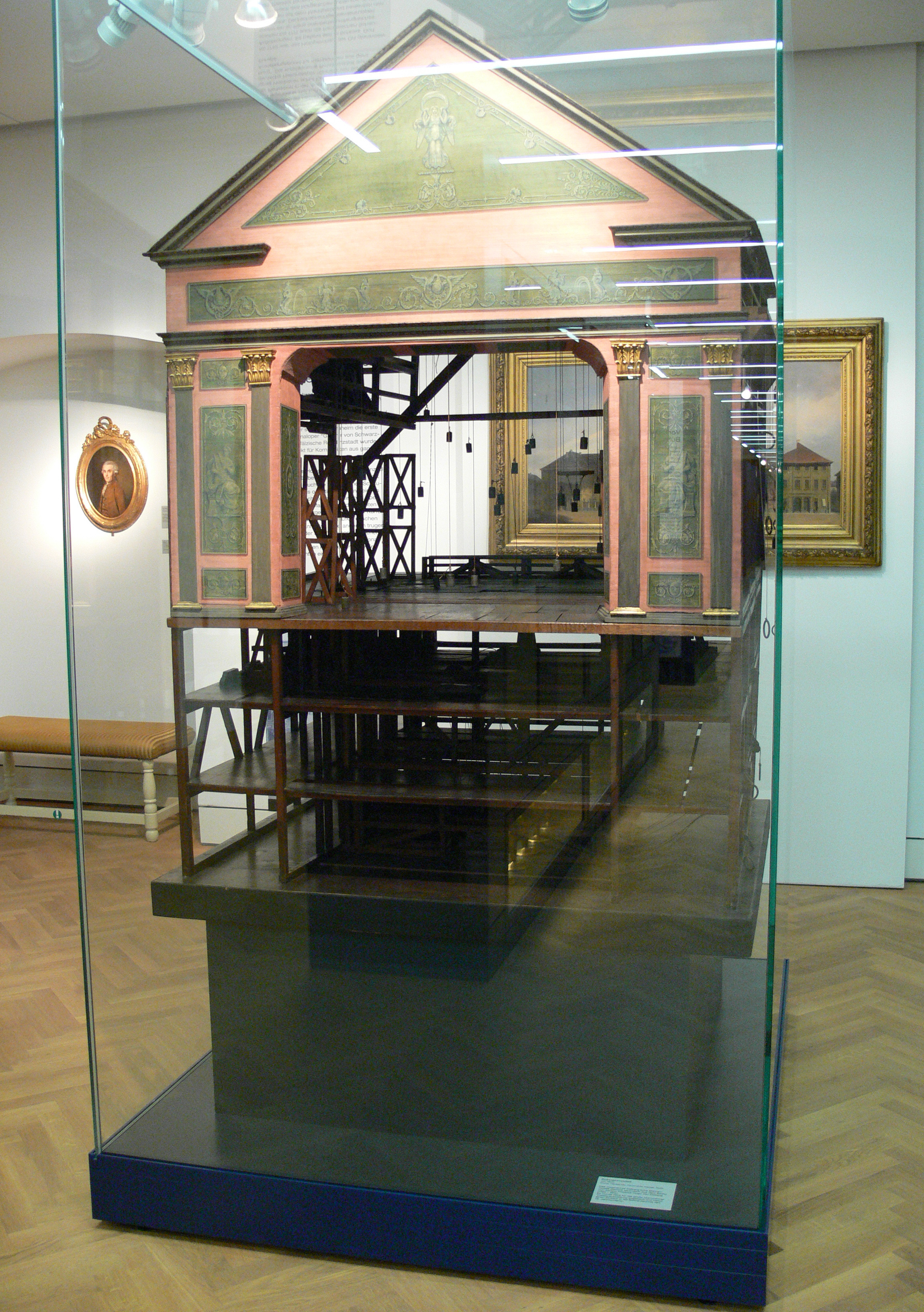 So genanntes Dalbergsches Bühnenmodell, um 1800 Collection: Reiss-Engelhorn-Museen, Mannheim